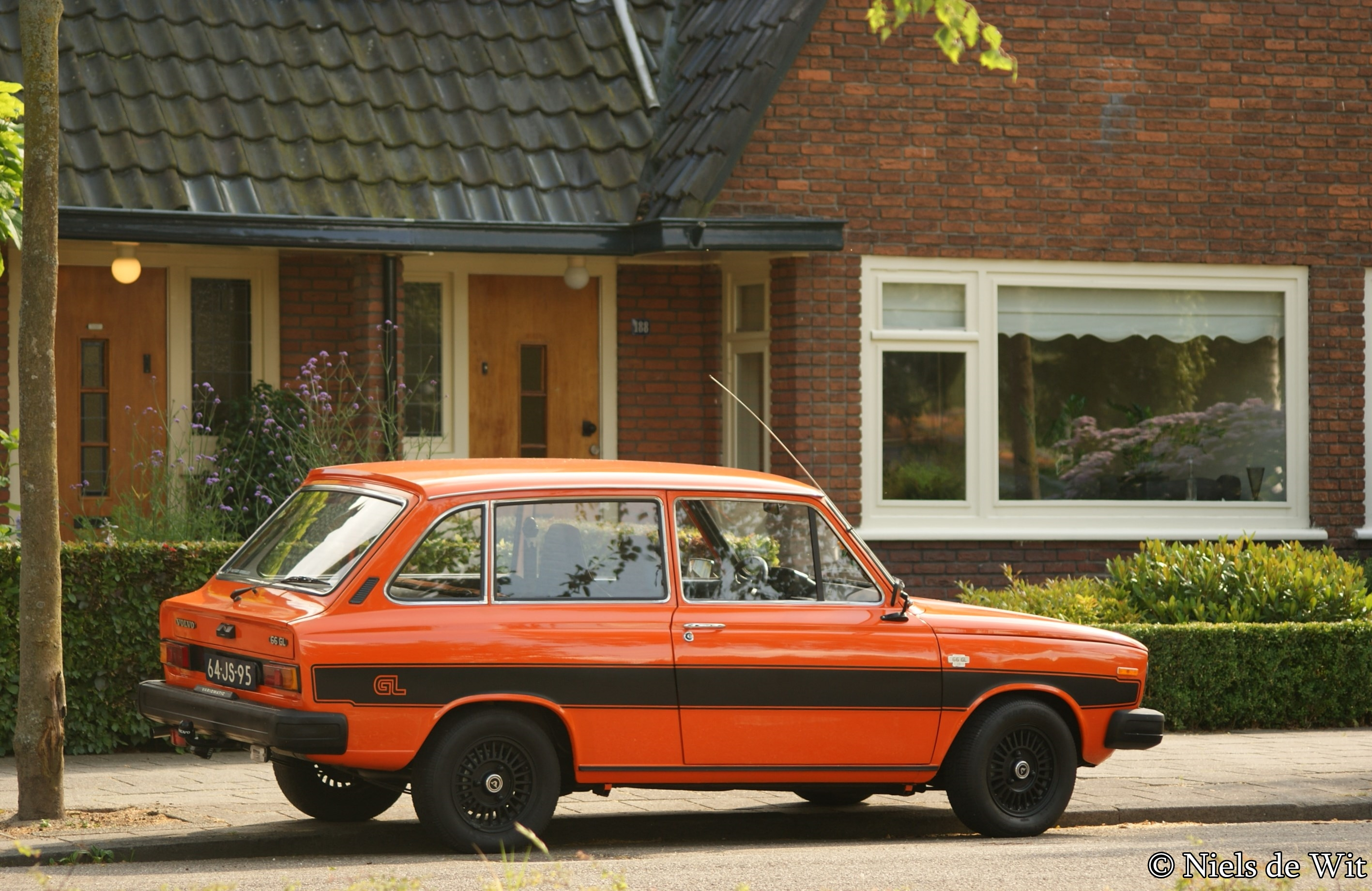 64-JS-95